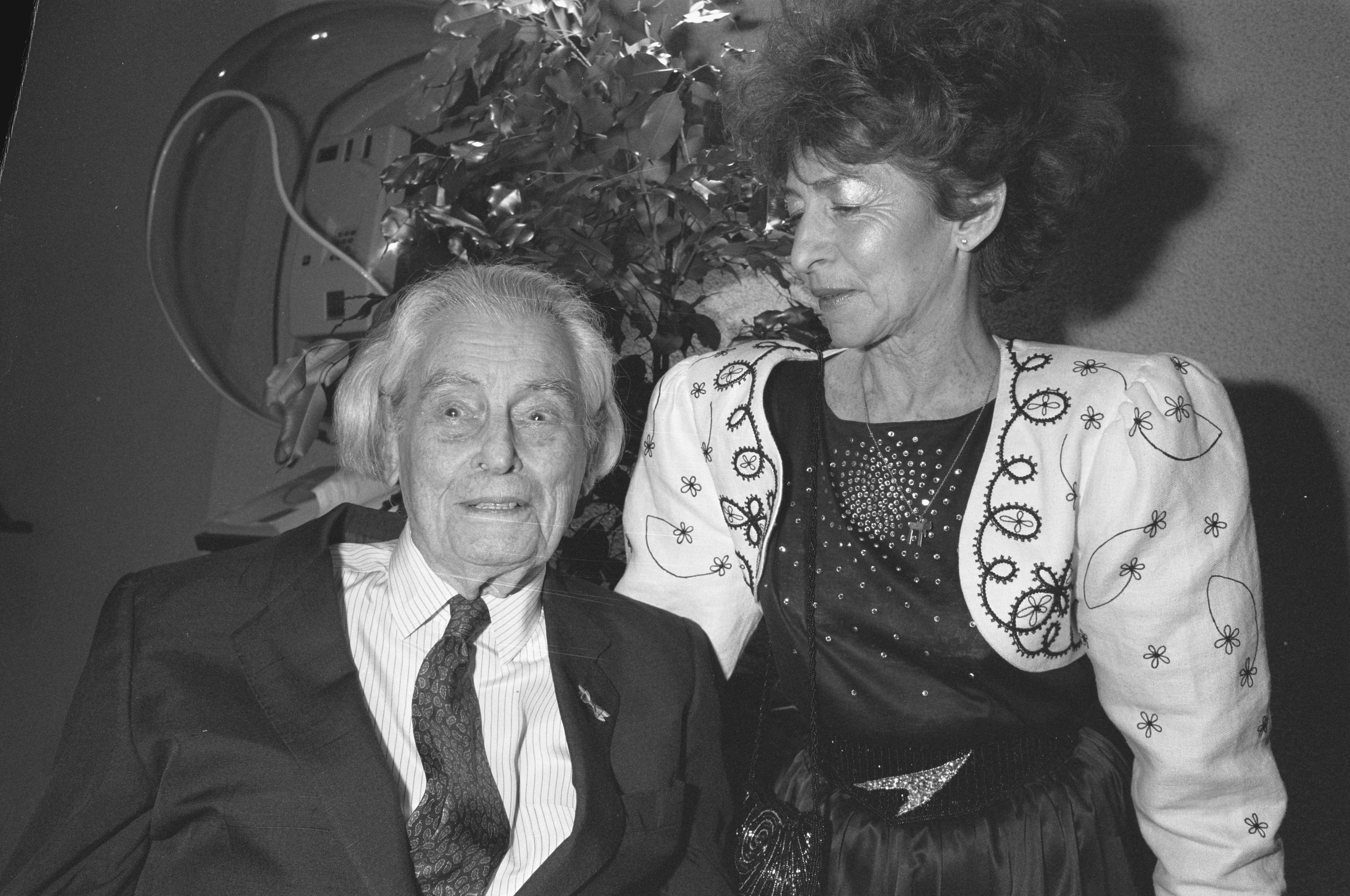 Collectie / Archief : Fotocollectie Anefo Reportage / Serie : Filmfestival Rotterdam Beschrijving : Filmregisseur Joris Ivens en zijn vrouw Marceline Loridan Annotatie : Nr. 15: Filmregisseur Joris Ivens en zijn vrouw Marceline Loridan Nr. 16, 17: Filmregisseur Joris Ivens en Koningin Beatrix Datum : 26 januari 1989 Locatie : Rotterdam, Zuid-Holland Trefwoorden : filmfestivals, filmregisseurs Persoonsnaam : Ivens, J., Loridan, Marceline Fotograaf : Croes, Rob C. / Anefo Auteursrechthebbende : Nationaal Archief Materiaalsoort : Negatief (zwart/wit) Nummer archiefinventaris : bekijk toegang 2.24.01.05 Bestanddeelnummer : 934-3943